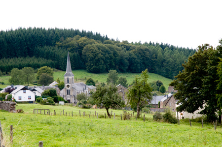 Mogimont et son église des Saints-Pierre-et-Paul.